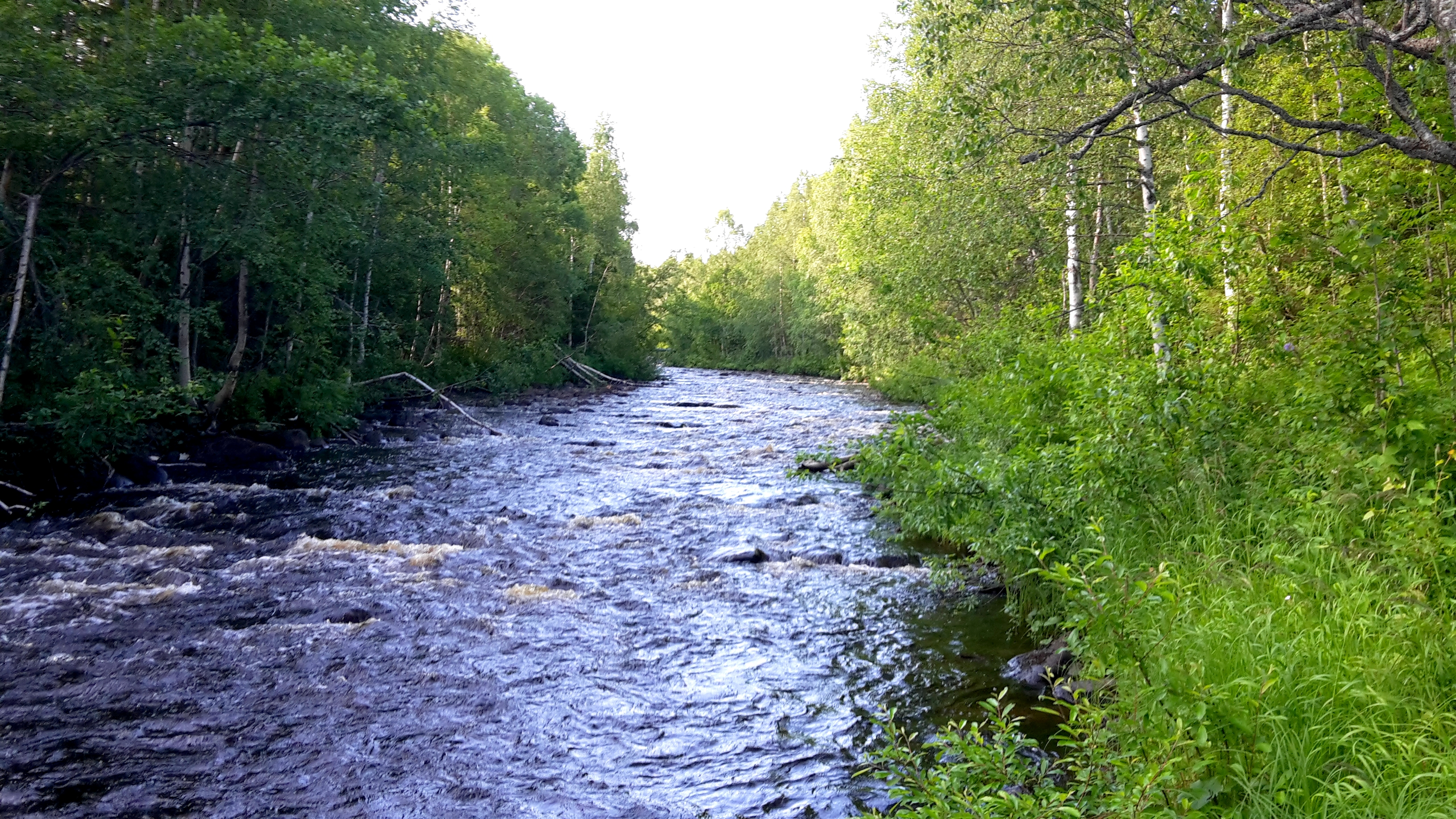 Foto från ett stilla avsnitt av Leduån ovanför Sunnansjön.